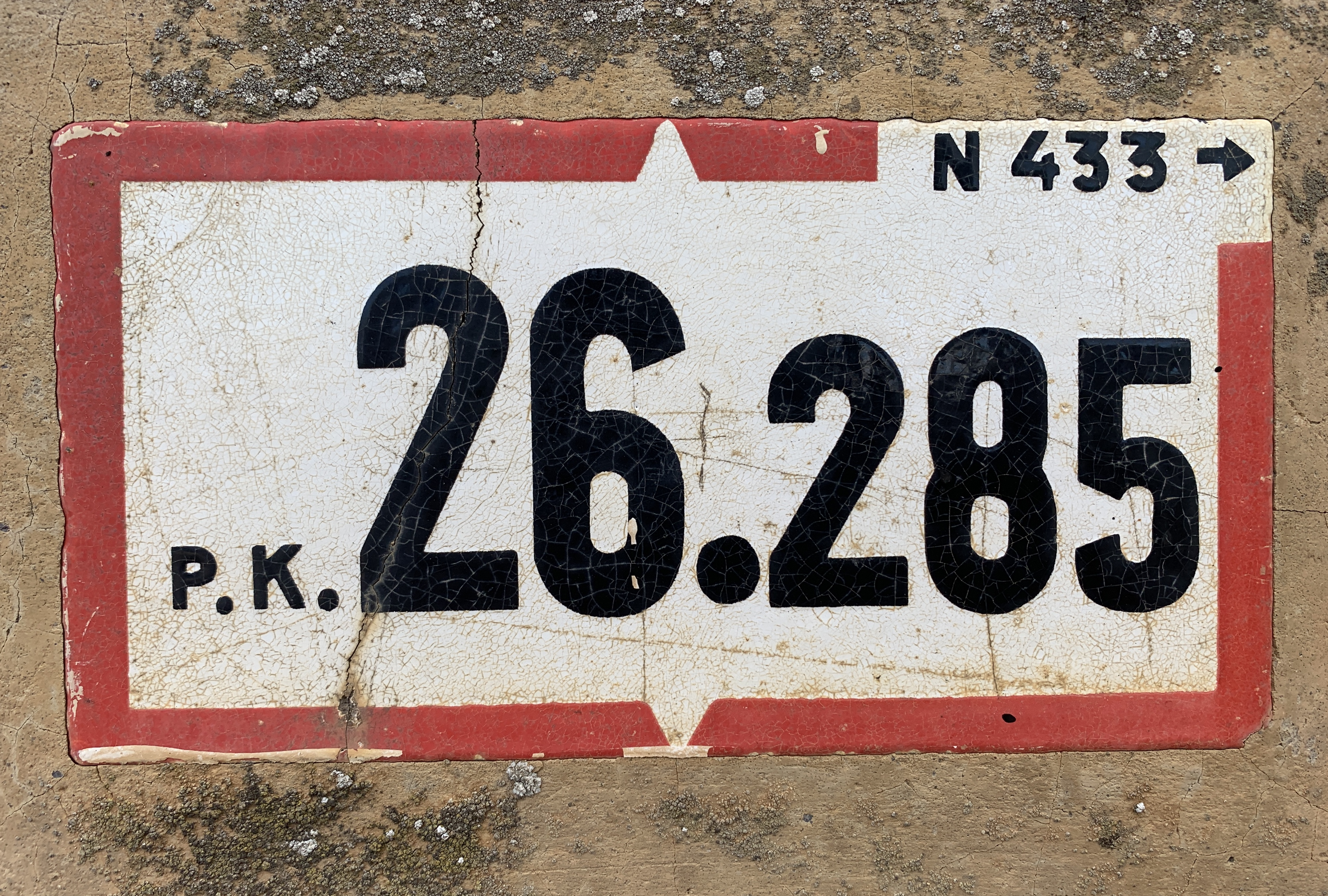 Panonceau du point kilométrique de la route nationale 433, route de Pont-de-Veyle, Replonges.